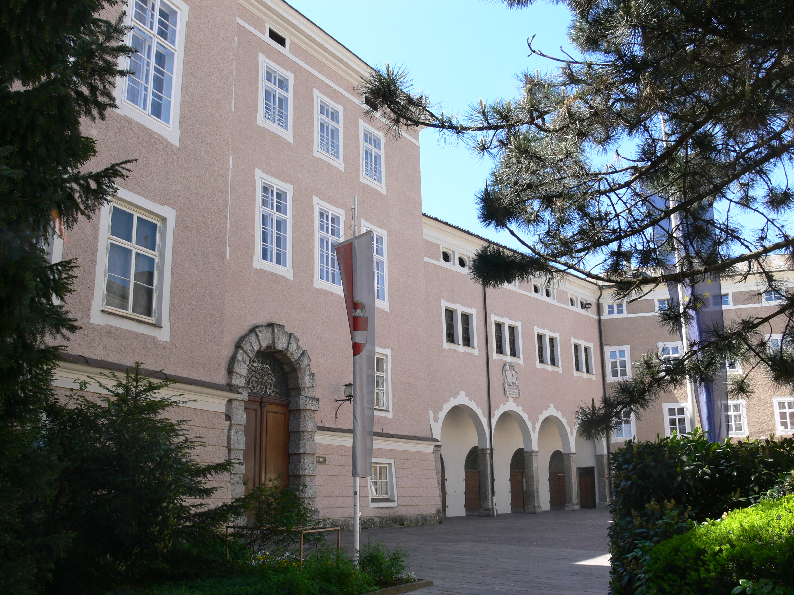 Chiemseehof in Salzburg (Kaiviertel), Sitz des Salzburger Landtags und der Salzburger Landesregierung